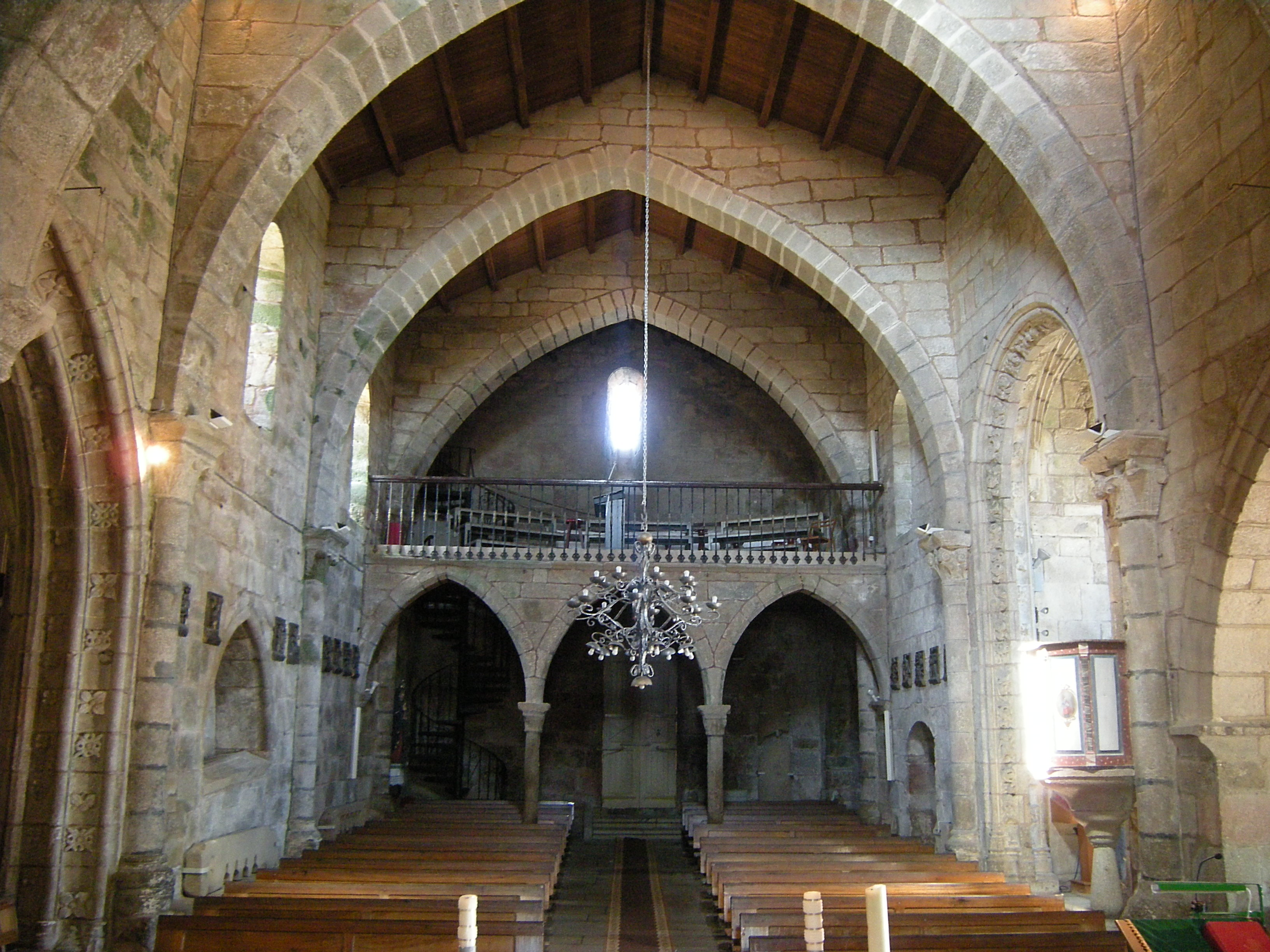 Interior de la iglesia desde el presbiterio.